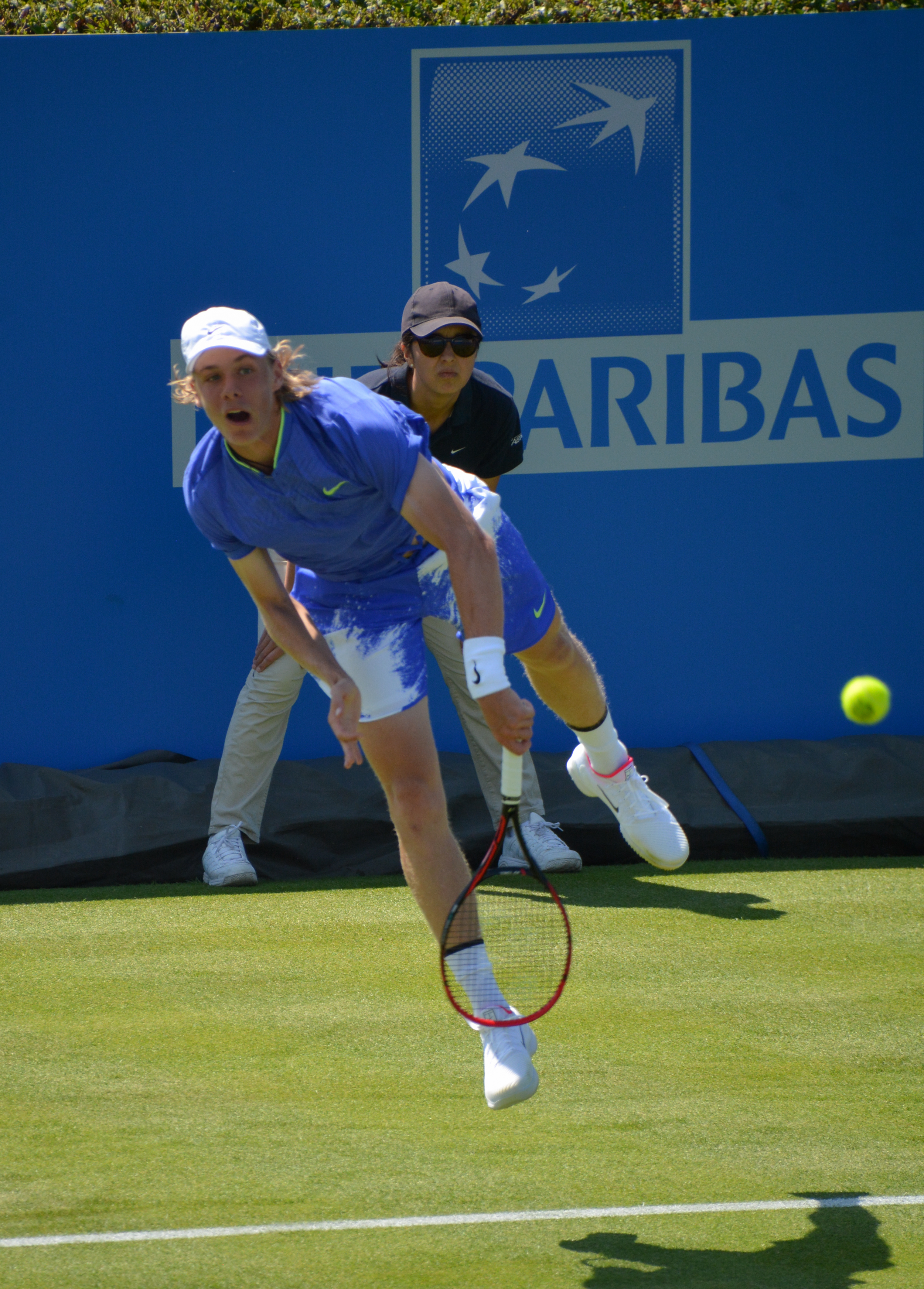 Denis Shapovalov